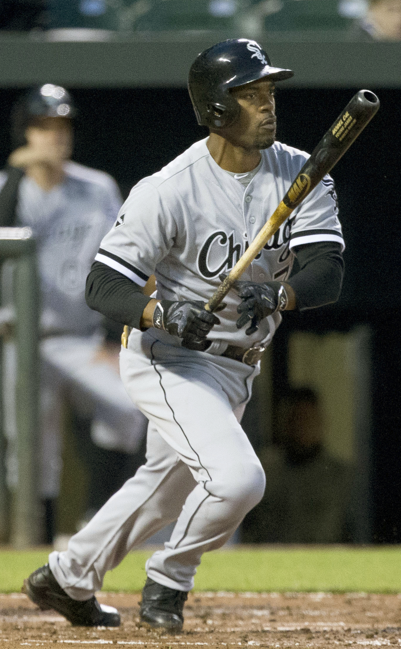 Jimmy Rollins